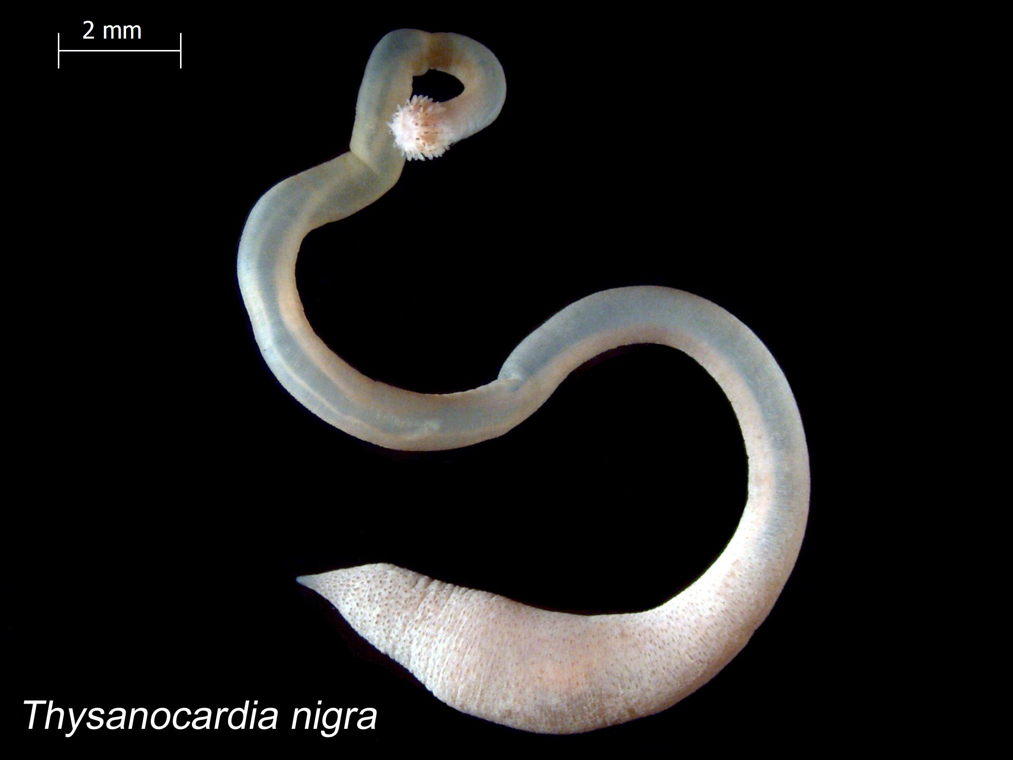 Thysanocardia nigra (Ikeda 1904)